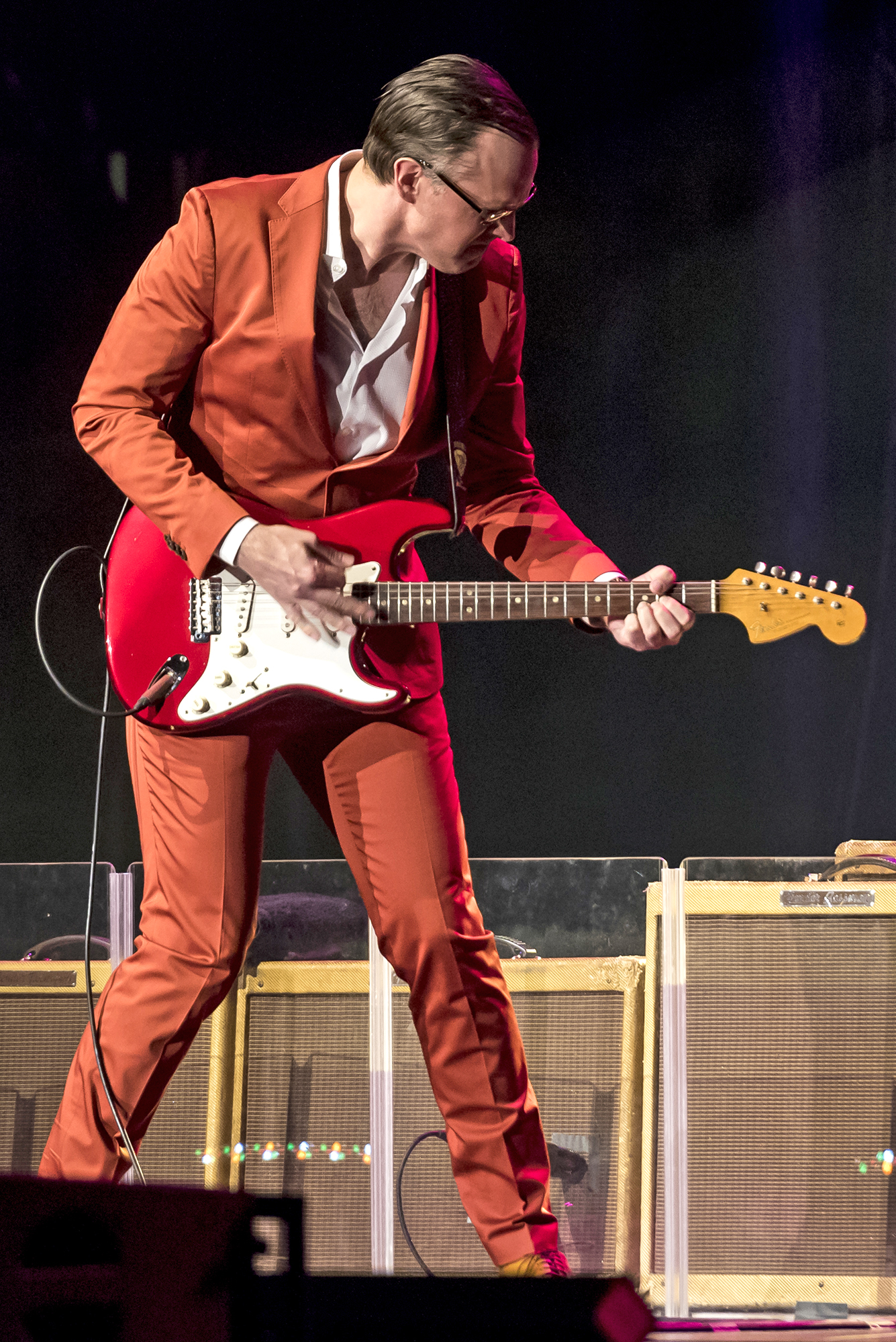 Der amerikanische Gitarrist Joe Bonamassa spielt am Samstag (05.03.2016) in der Jahrhunderthalle Frankfurt.